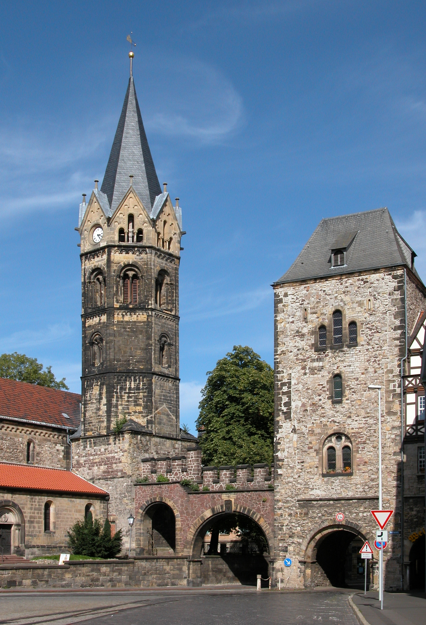 Nikolaikirche and Nikoliator, Karlsplatz, Eisenach.